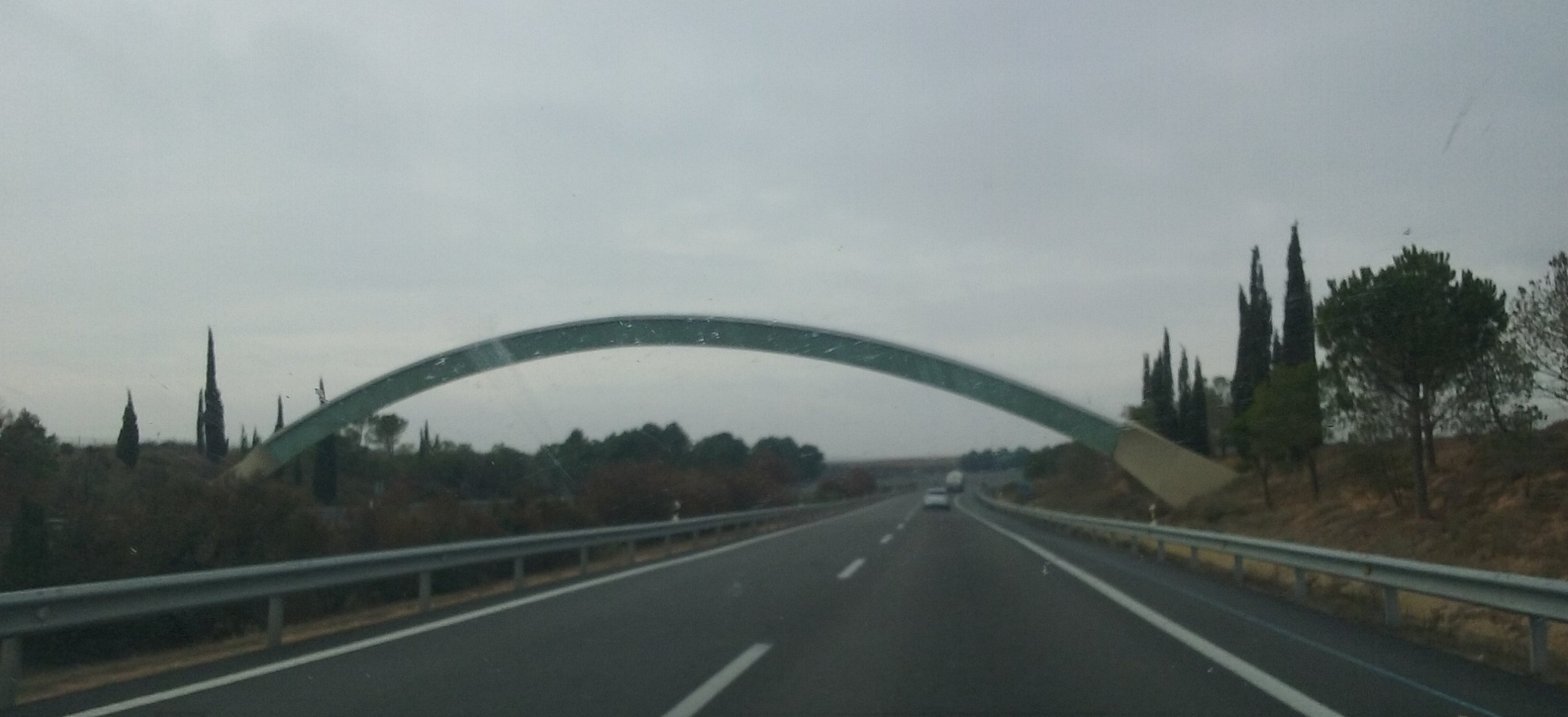 Arco indicativo del paso del Meridiano de Greenwich (ED-50) sobre la autopista AP-2 en las inmediaciones de Fraga (Huesca-España)